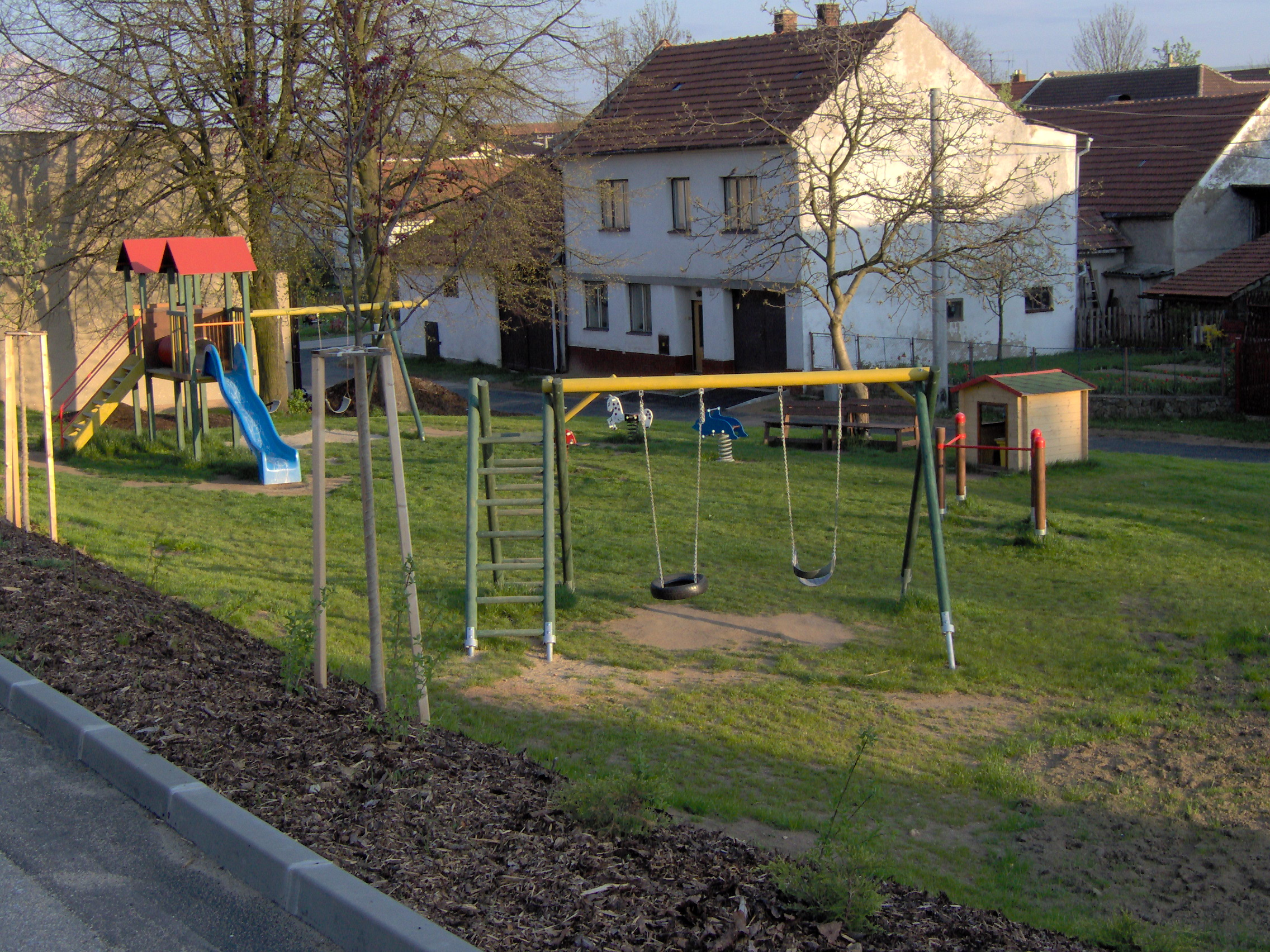 Dětské hřiště v obci Jabloňov